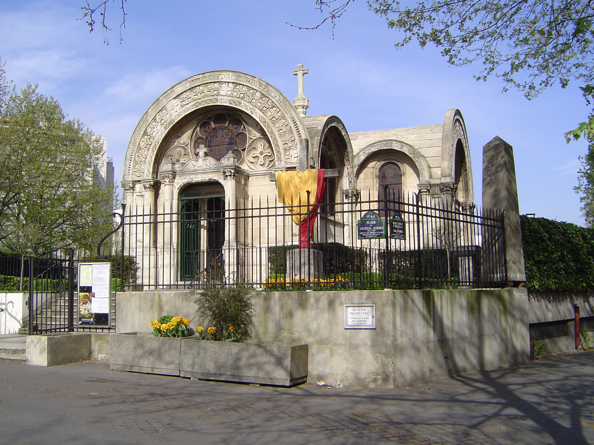 Photos prises à Paris